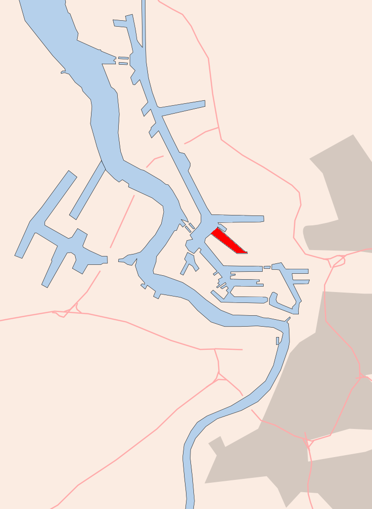 Antwerp , 6e havendok